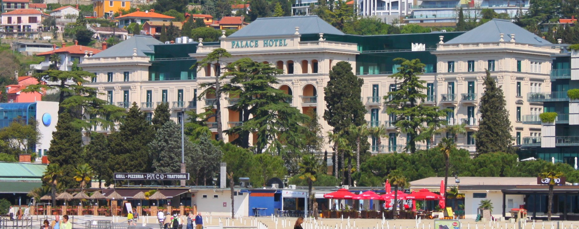 Palace Hotel Portorož